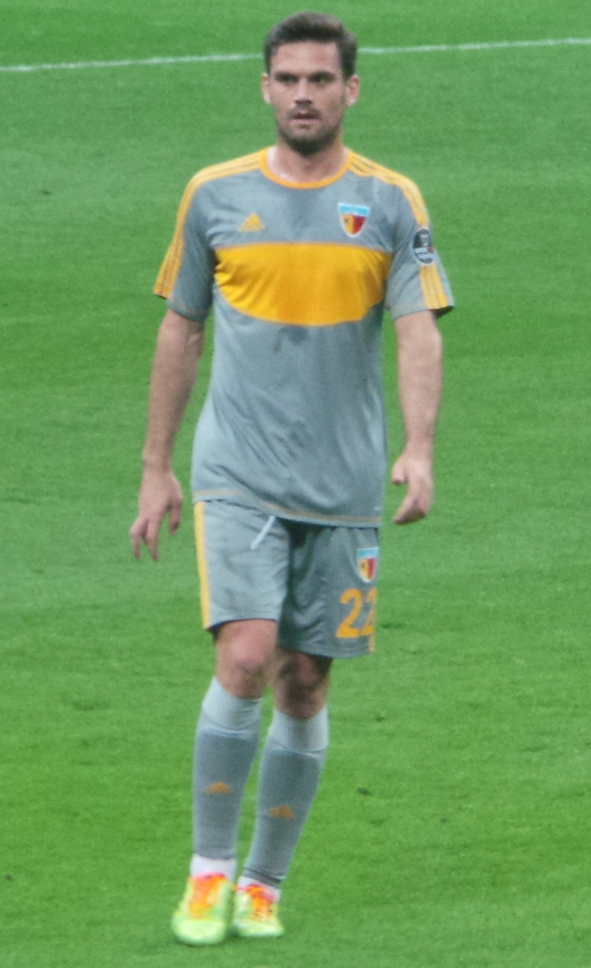 Aleksandros Tziolis